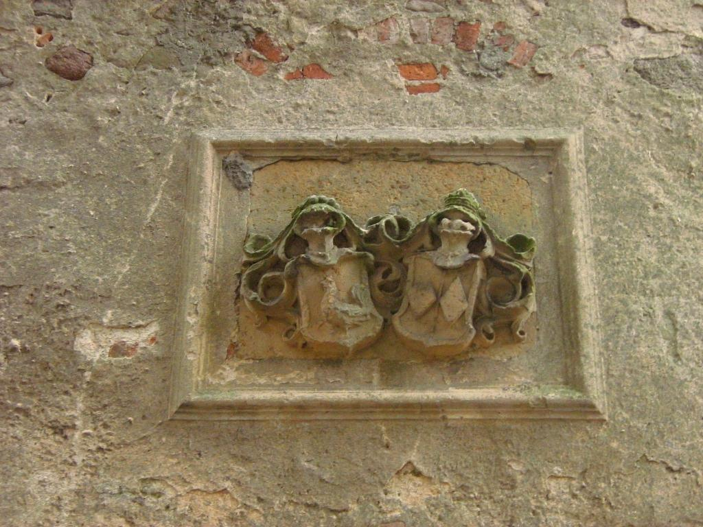 Die Dorfkirche in Neddemin (Landkreis Mecklenburgische Seenplatte).